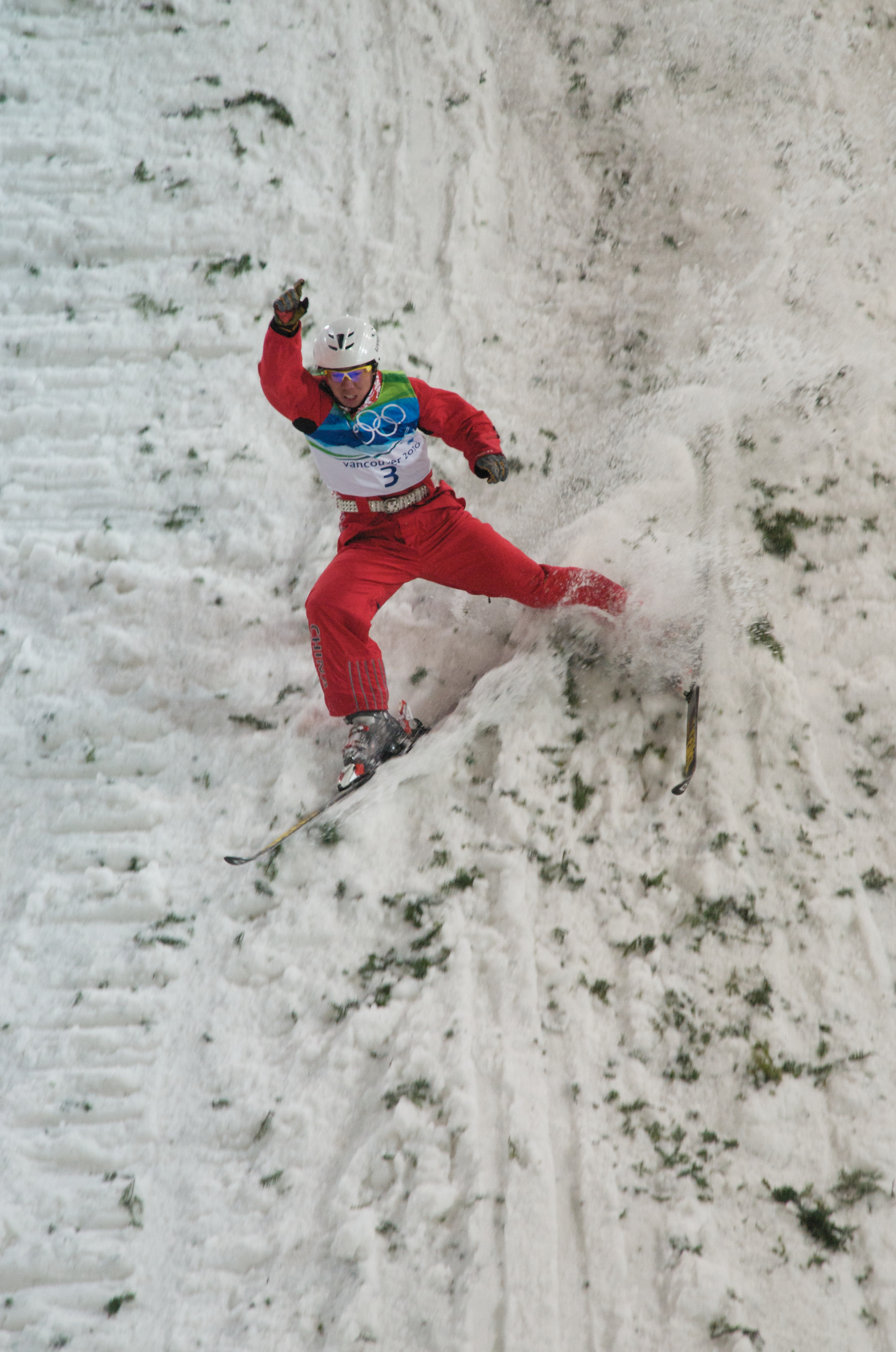 Freestyle Skiing Mens Aerials Final.